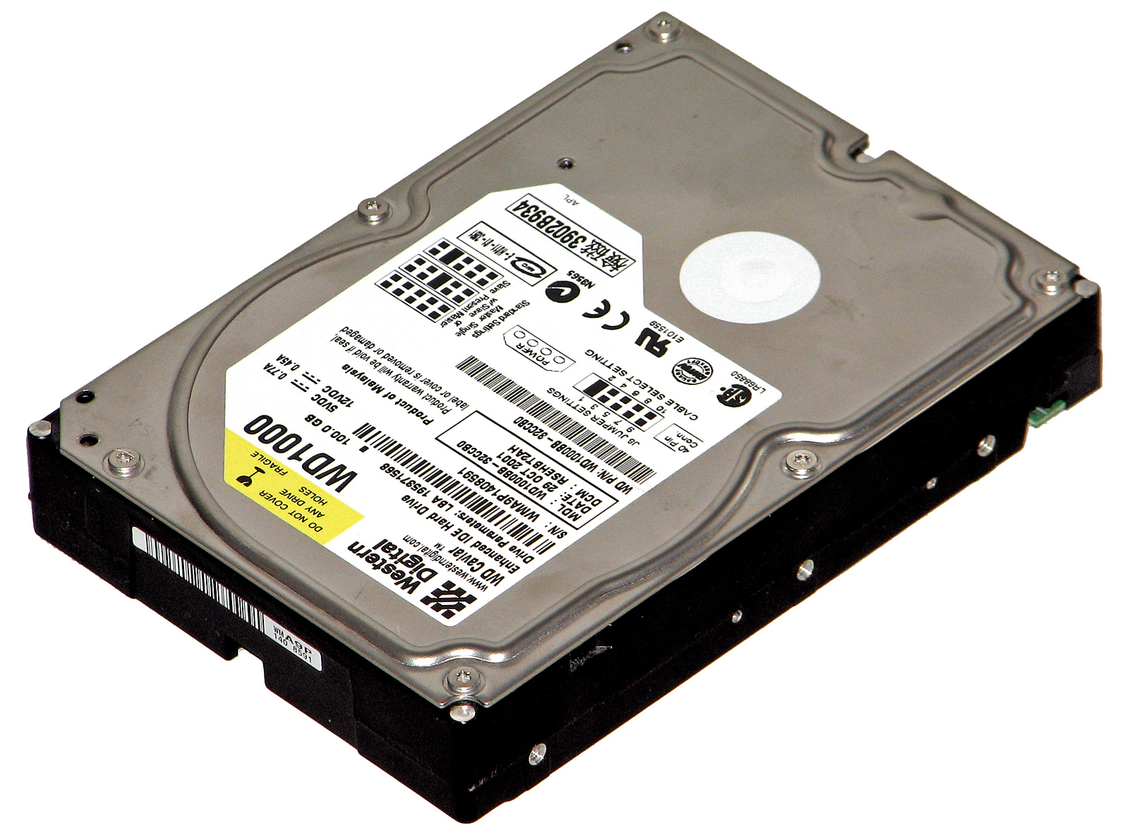 Dieses Bild zeigt eine IDE-Festplatte (Western Digital WD1000 - 7200 U/Min - 100 GB).